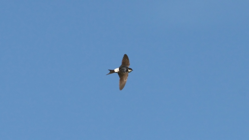 House Martin (Delichon urbicum)